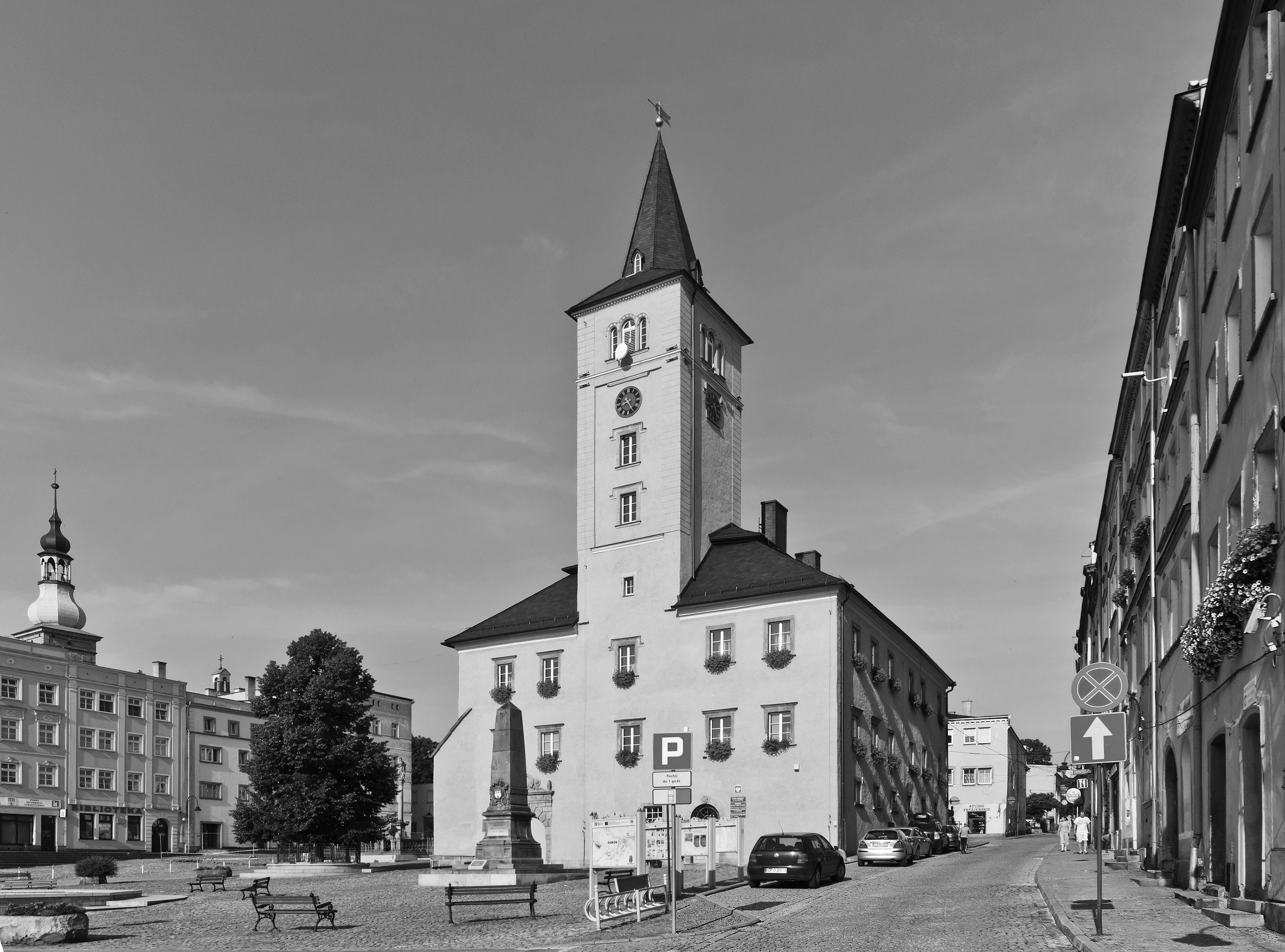 Radków, ratusz i rynek.